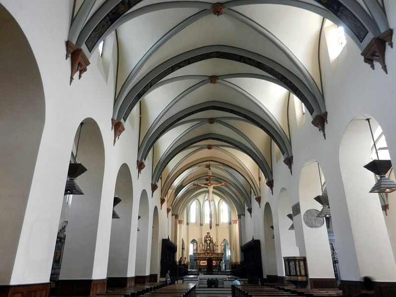 Aosta - Interno della Cattedrale